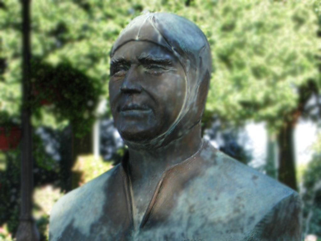 Autore: Giorgio Gentili; Fonte: Giorgio Gentili; Descrizione: Busto di Luigi Fagioli (Osimo, giardini pubblici).